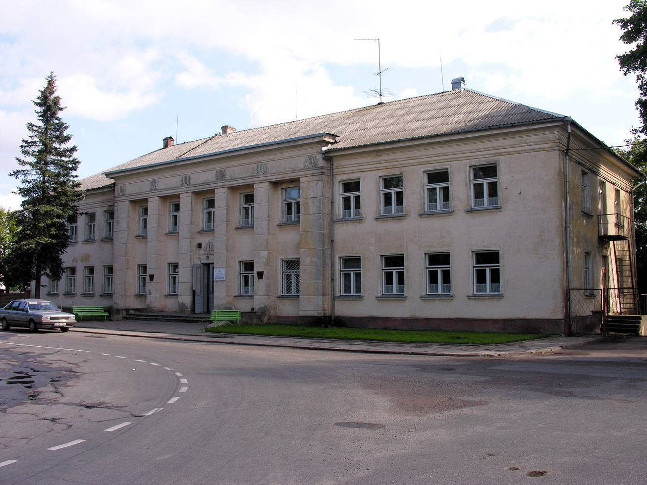 Sedos ligoninė